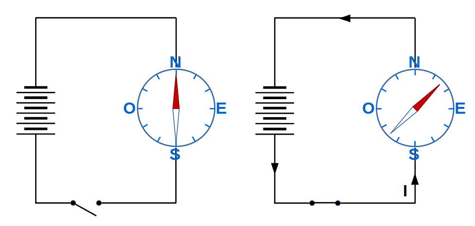 Experiment d'Oersted. Una bateria proporciona un corrent elèctric d'intensitat I que circula per un conductor amb una secció orientada nord-sud just davall una brúixola. Quan passa el corrent l'agulla magnètica es desvia cap el nord-est si la intensitat circula de sud a nord.